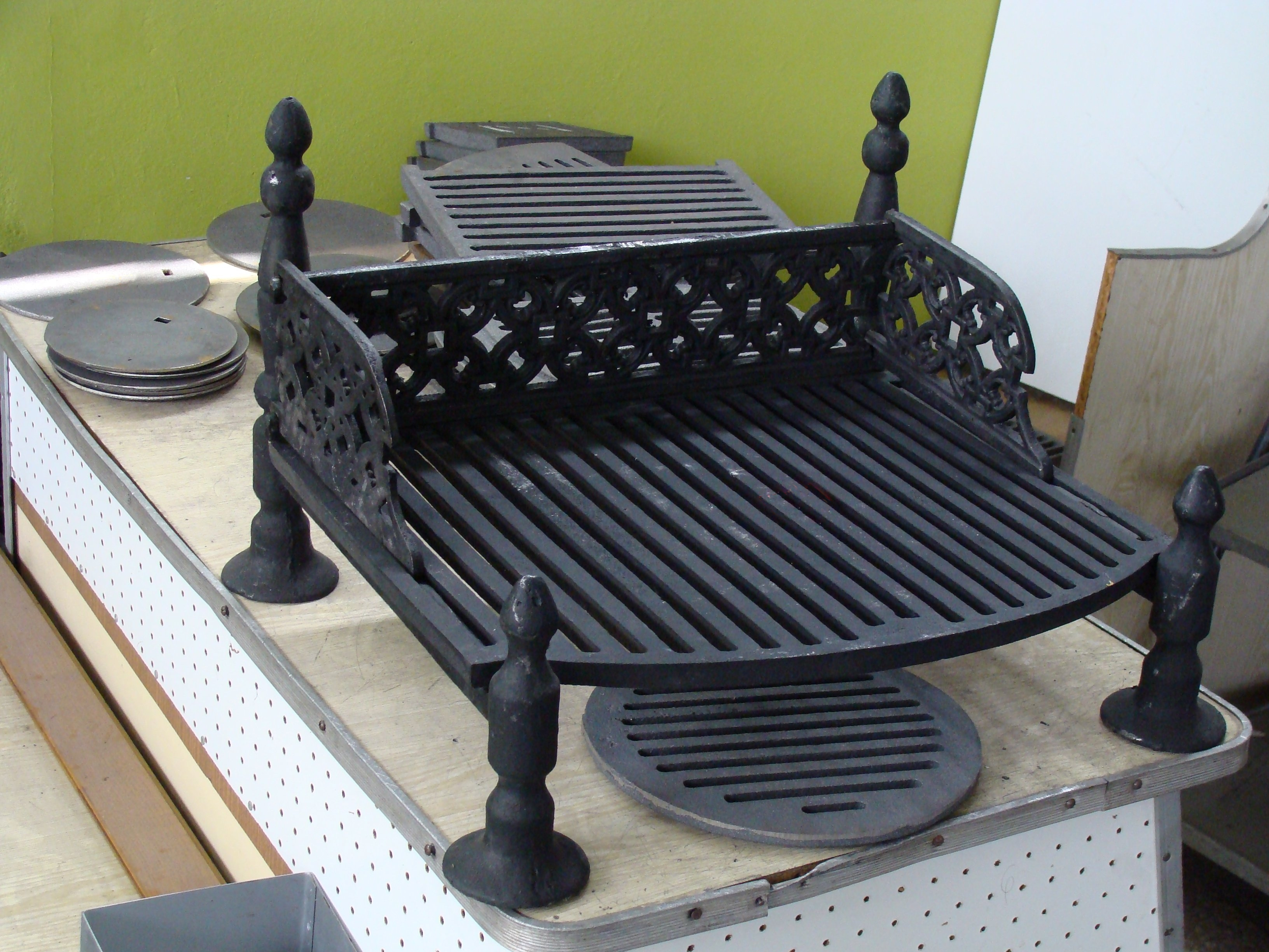 Różne rodzaje rusztów piecowych (nieprzemysłowych)